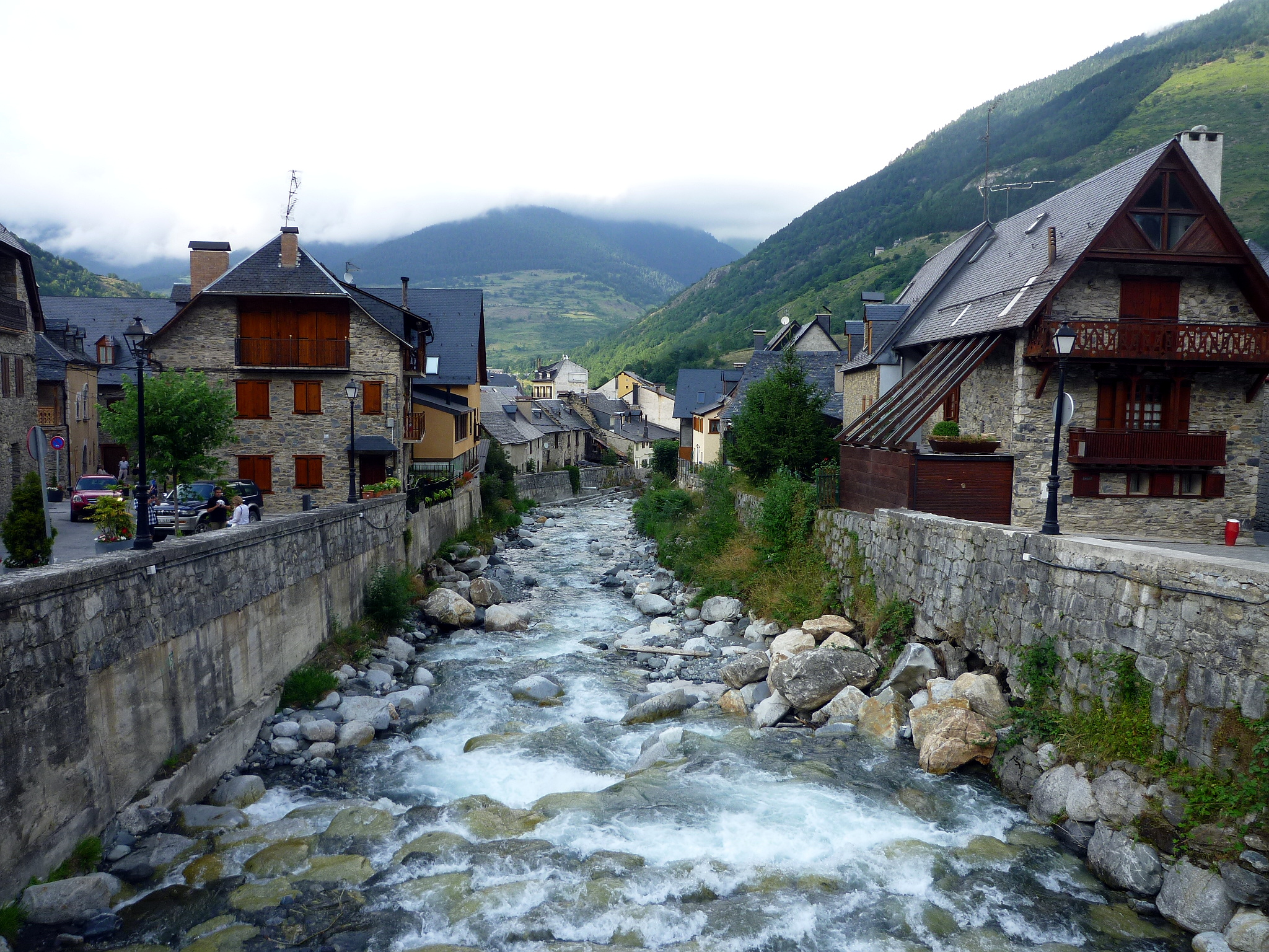 Barri d'eth Cap dera Vila i passèg dera Libertat a Vielha (Vielha e Mijaran, Val d'Aran).